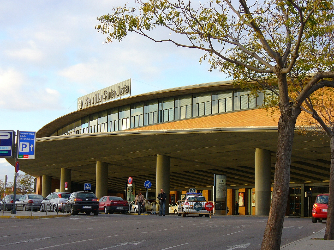 Acceso principal a Santa Justa